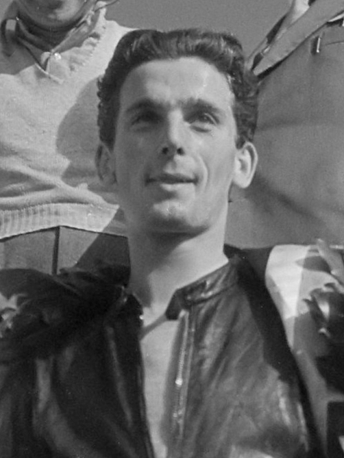 TT-races Assen Masetti 27 juni 1952